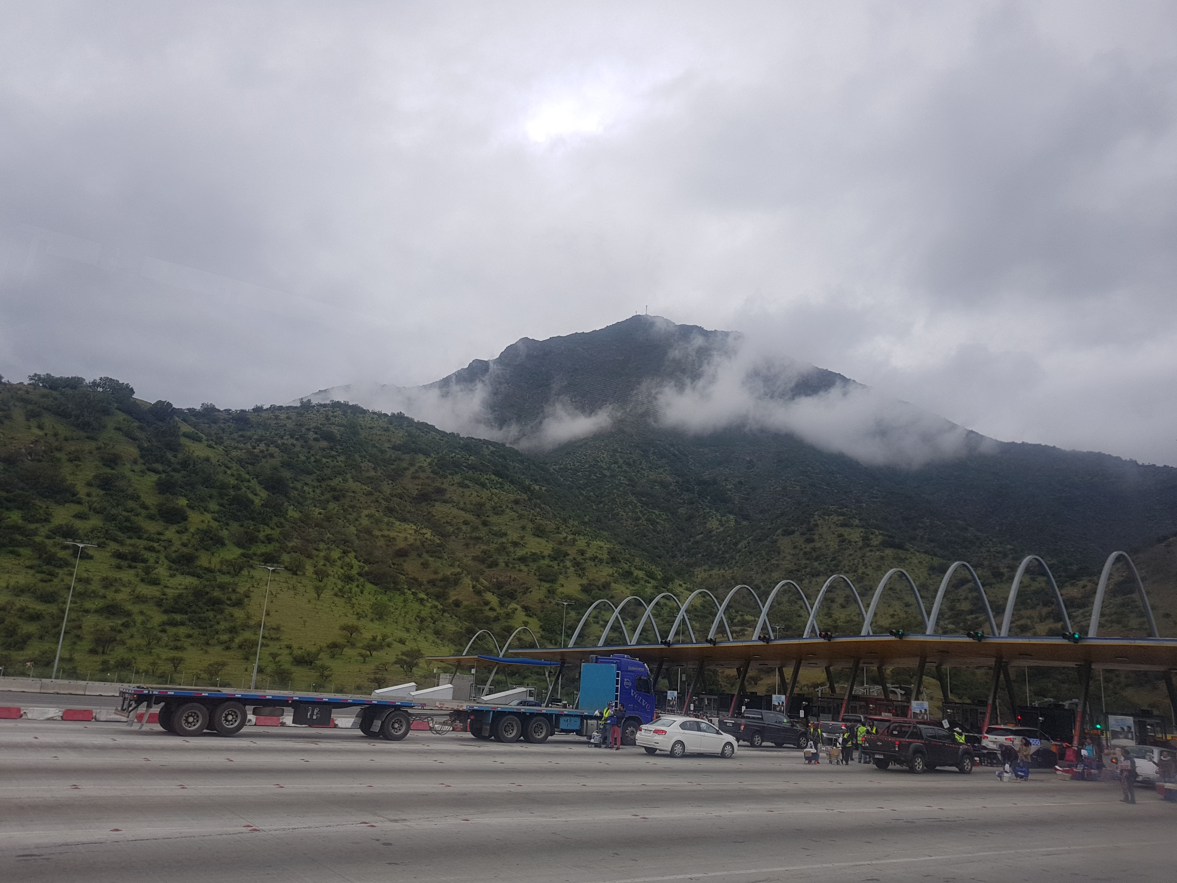 Vista del cerro Angostura desde el peaje homónimo, Región Metropolitana, Chile